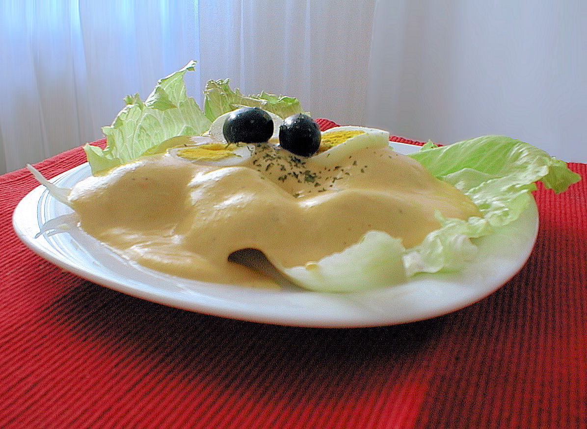 Papa a la Huancaina. Comida peruana. Entrante.